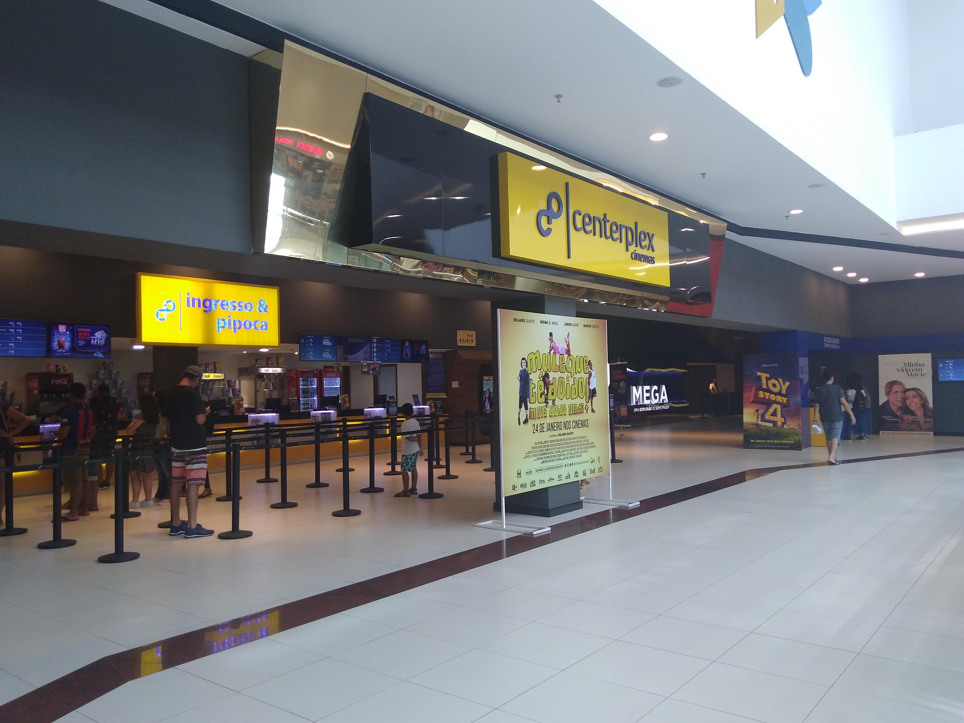 Vista da fachada e interior do complexo de cinemas Centerplex Pátio Norte Shopping, localizado na cidade de São José de Ribamar, MA